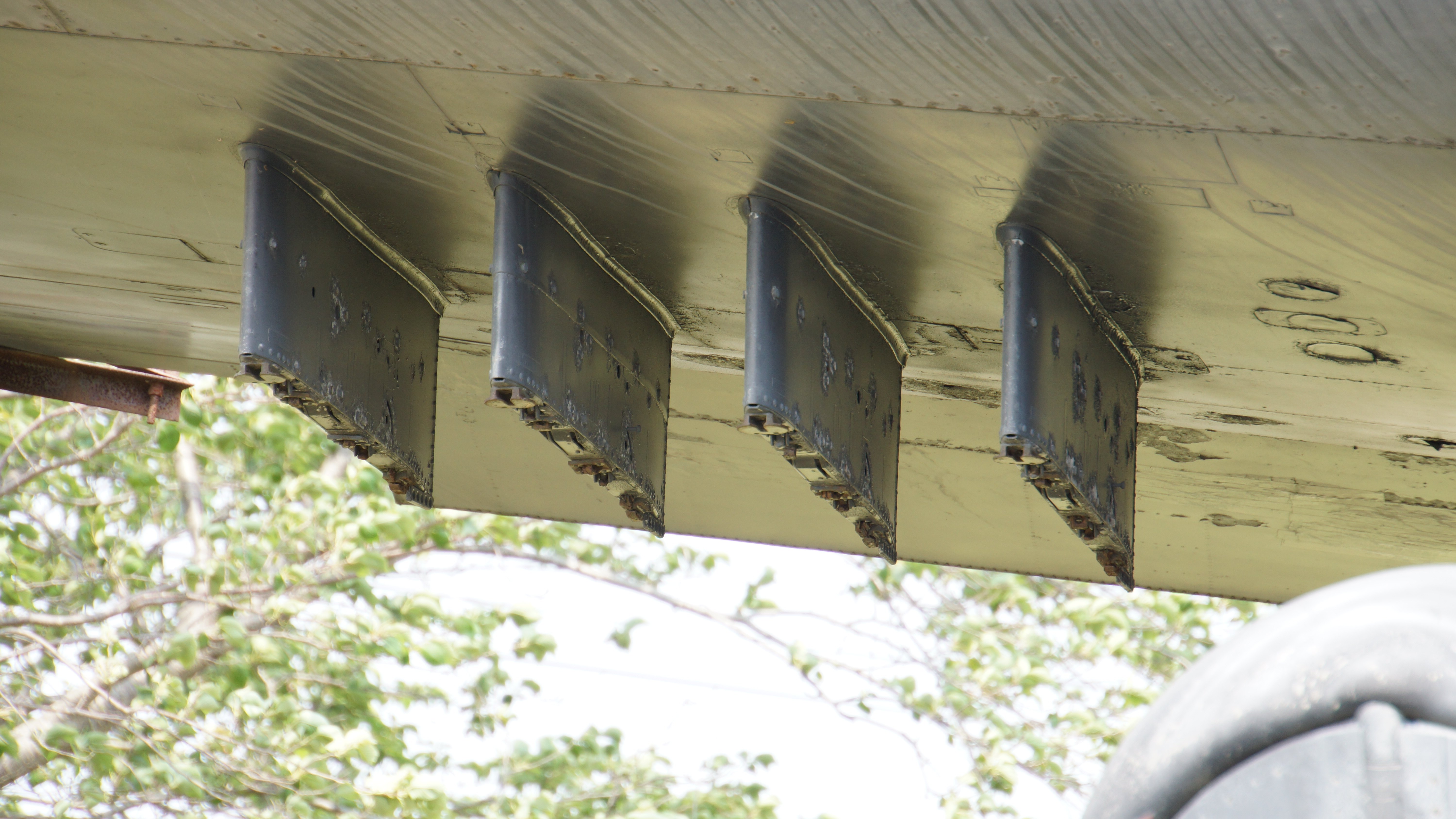 海上自衛隊 P-2V-7対潜哨戒機（4618号機） ハードポイント（右主翼側） 左前面。2017年4月29日 海上自衛隊鹿屋航空基地史料館にて。